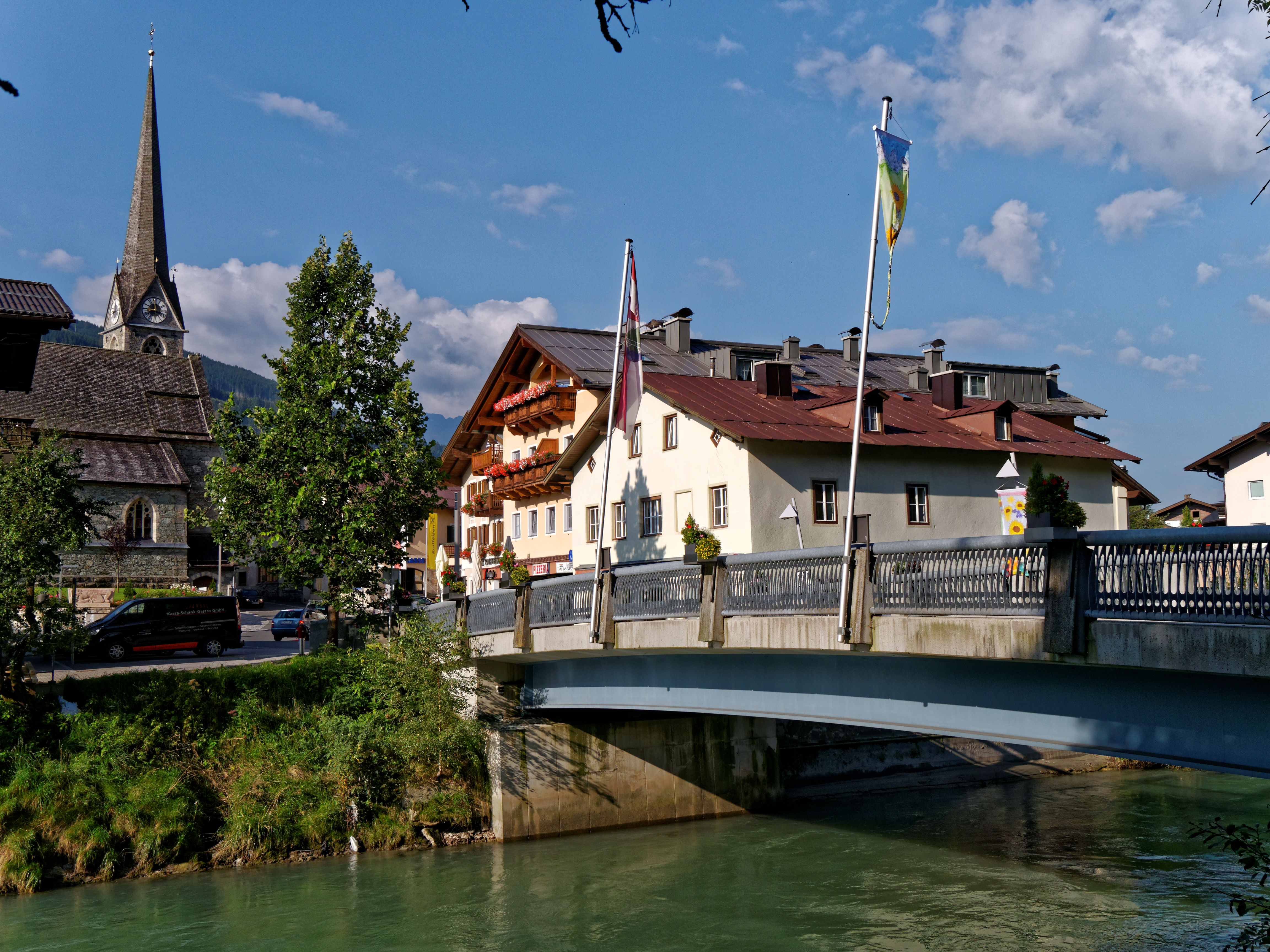 Blick von Nordosten auf die Glocknerbrücke in Bruck an der Großglocknerstraße